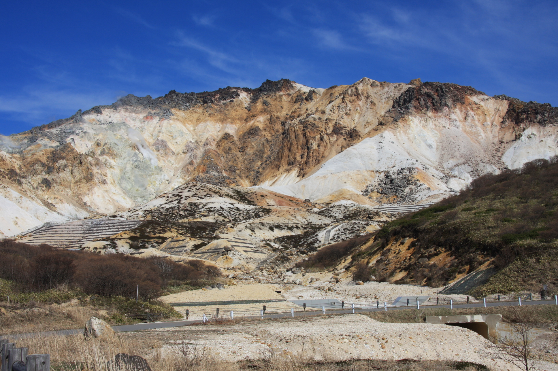 賽の河原から望む恵山